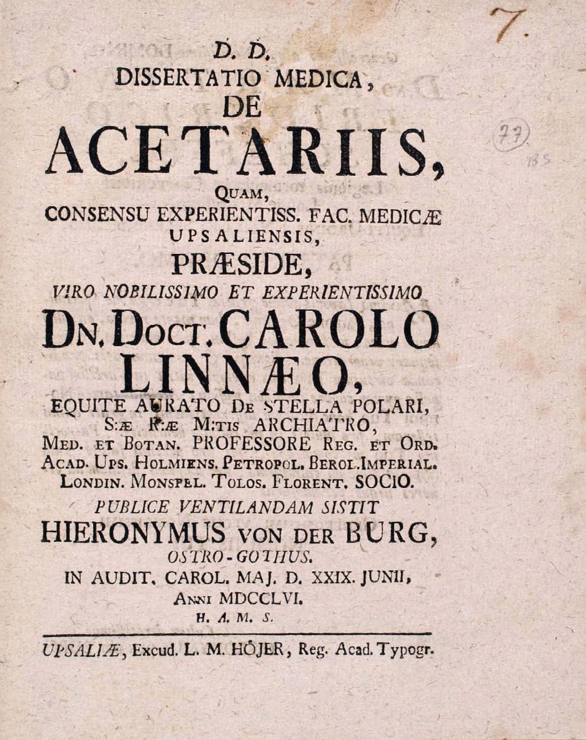 I Dissertatio medica, de acetariis, quam, consensus experientiss… (1756) avhandlade Hieronymus von der Burg ämnet sallader ("de acetariis" om salladsväxter) och deras inverkan på kroppen, samt beskriver ett antal lämpliga salladsväxter.